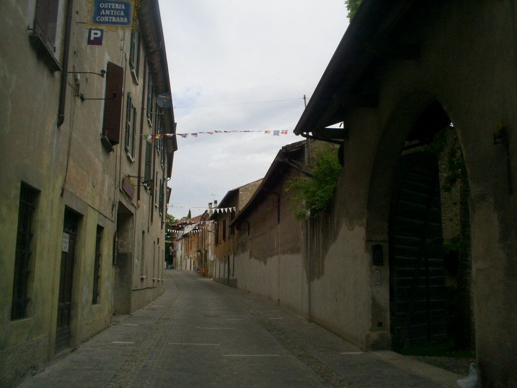 Solferino- uliczka w centrum miasteczka